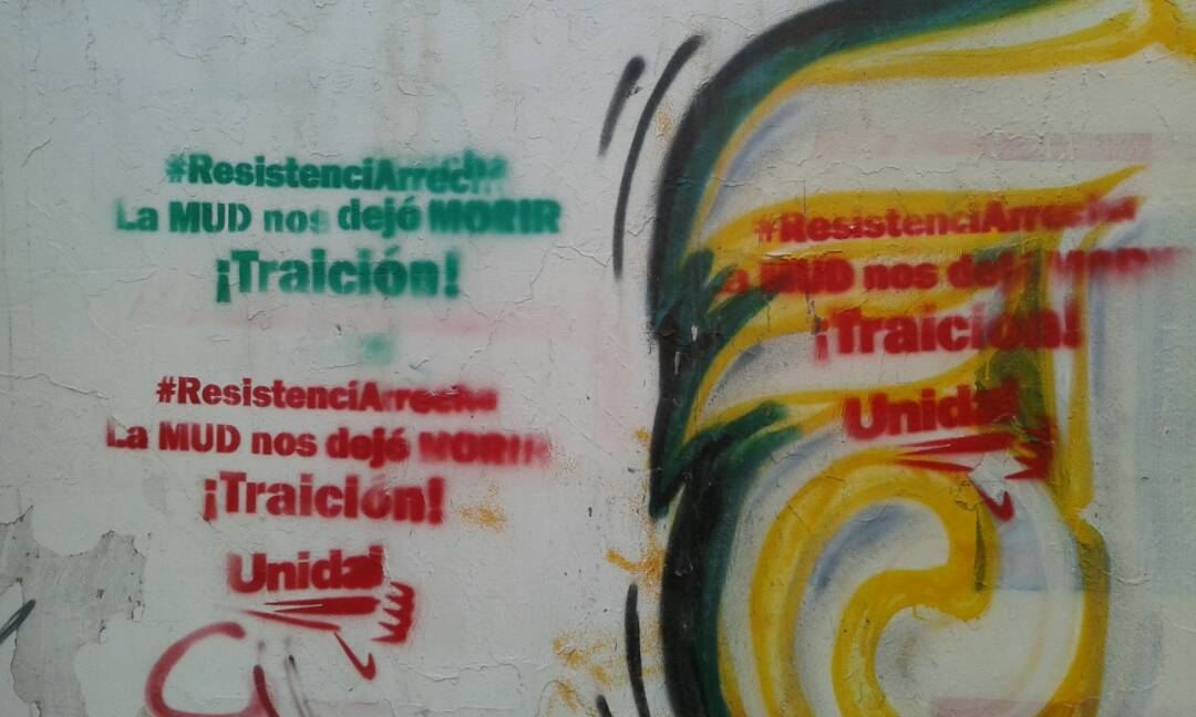 Graffitis en Caracas expresando descontento y decepción hacia la Mesa de la Unidad Democrática por su decisión de participar en las elecciones reginales de Venezuela de 2017